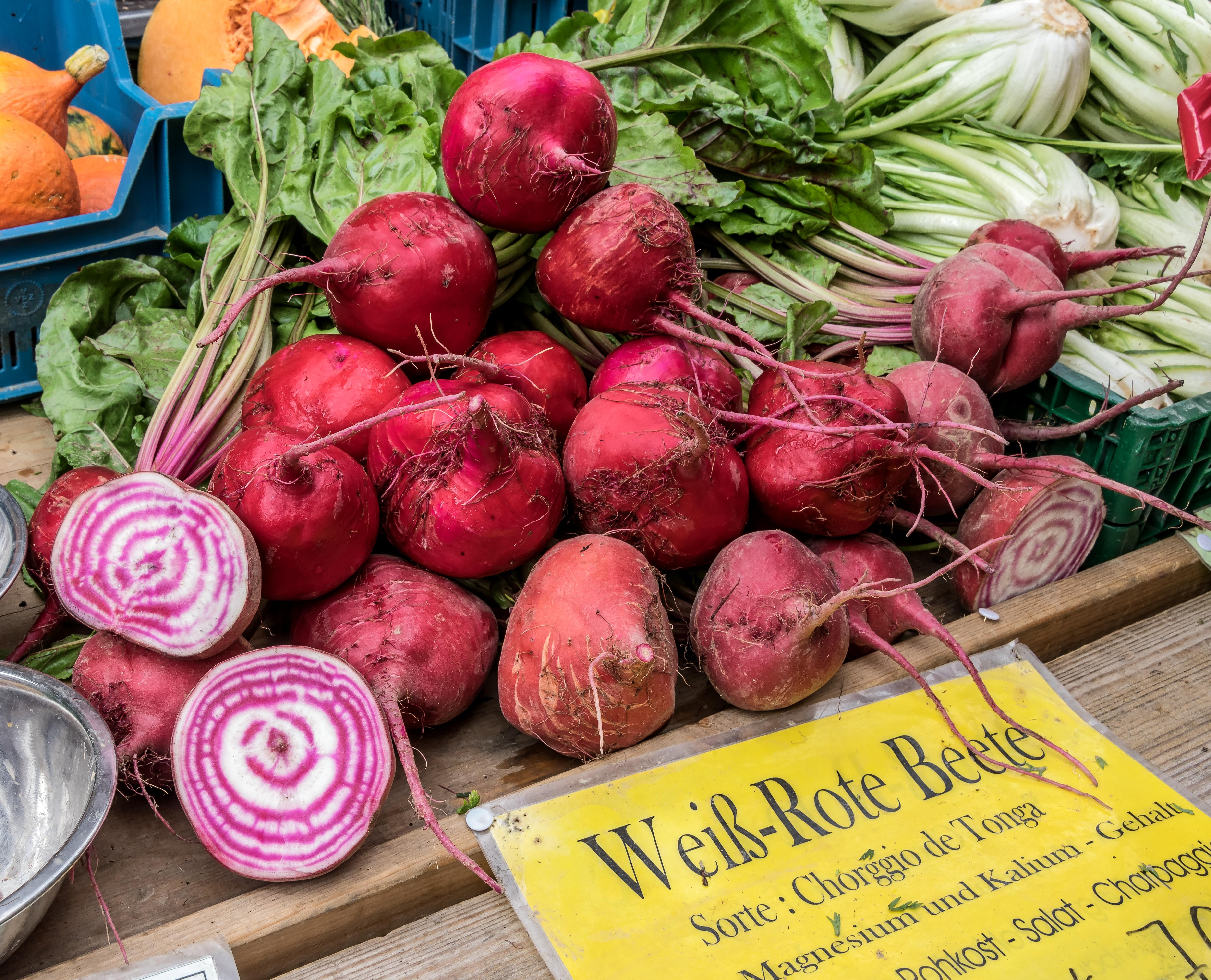 Bilder aus Freiburg im Breisgau